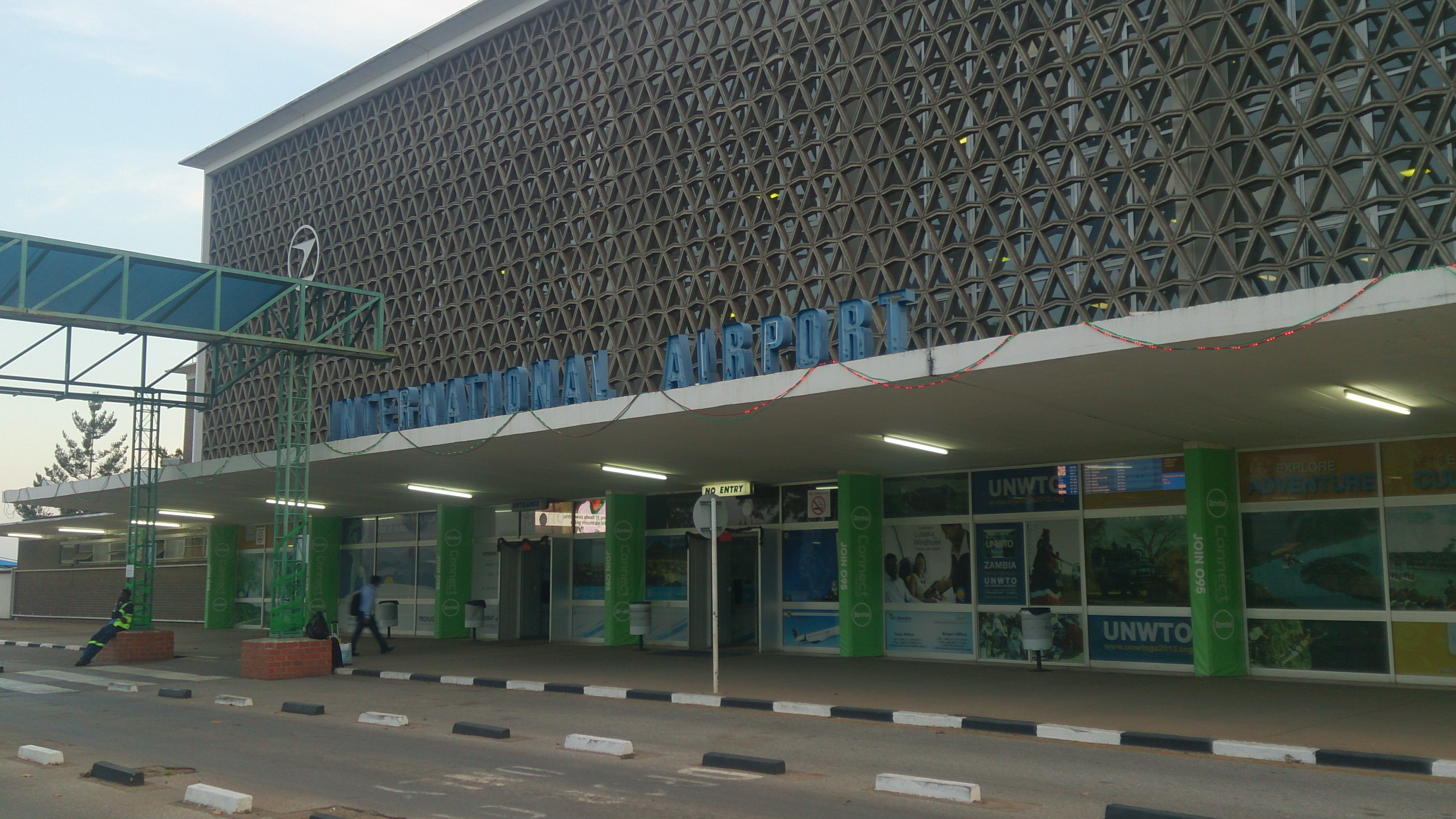 Lusaka International Airport